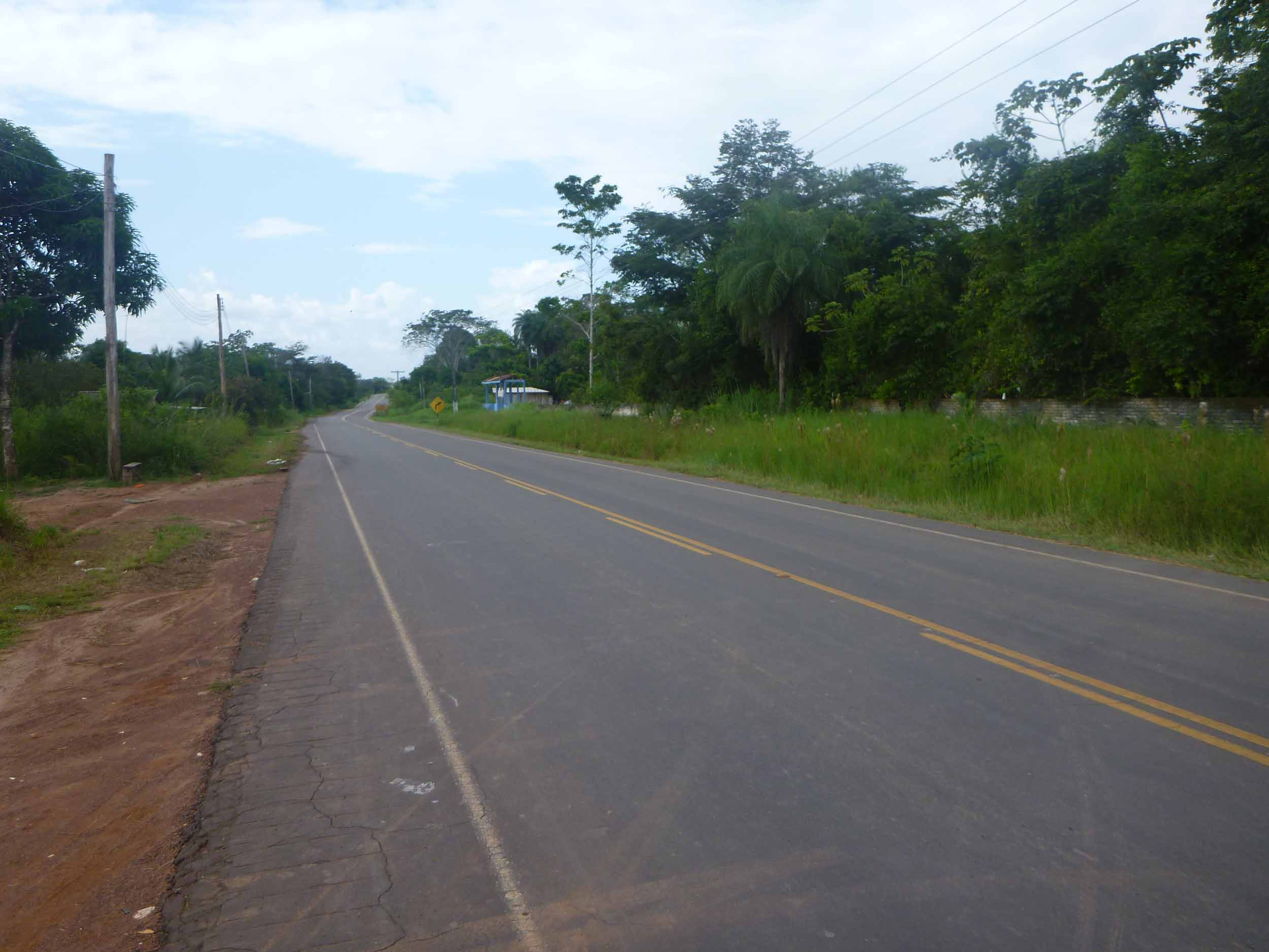 Pesquisa CNT de Rodovias 2012 - Foto: Arquivo/CNT